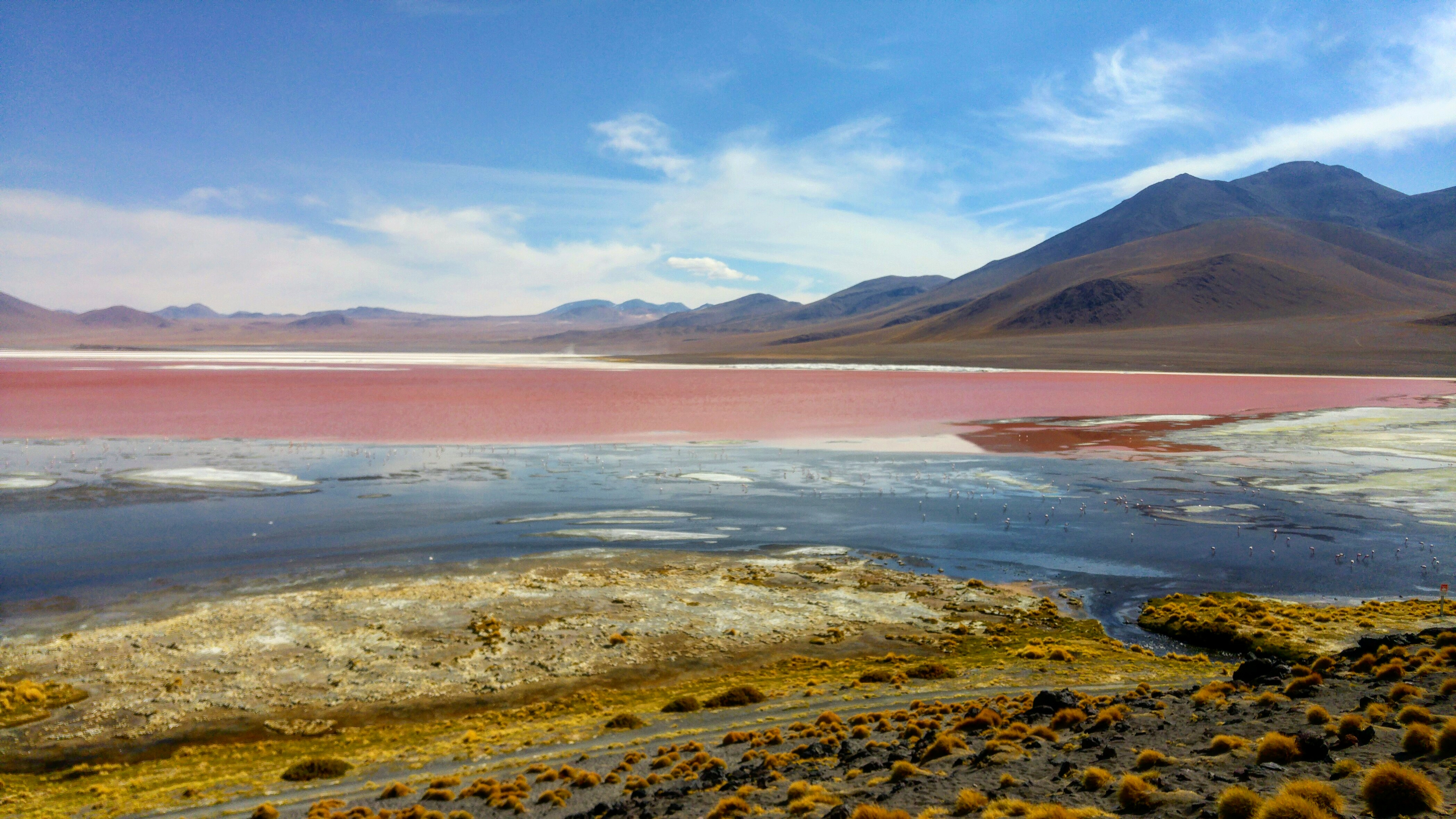 Laguna Roja Bolivia